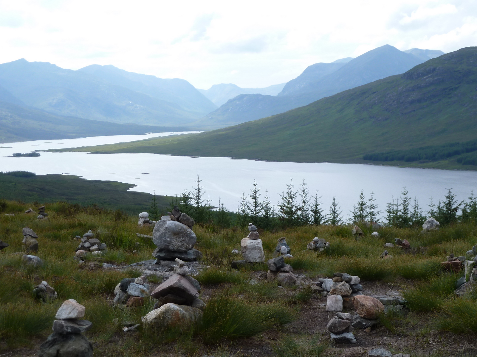 Loch Loyne cairns